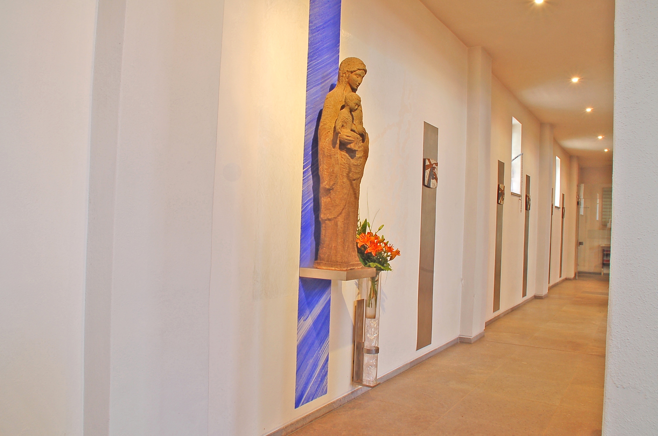 Muttergottes aus der St.Hedwigkirche erstellt in der Abtei Maria Laach